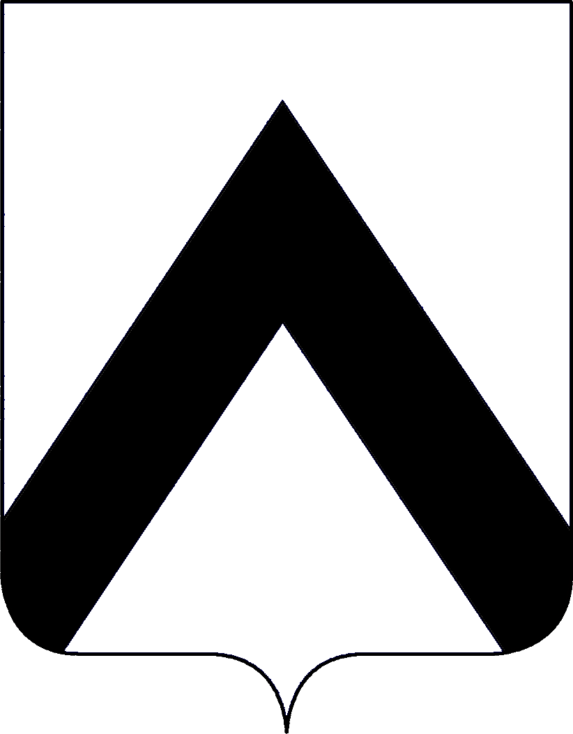 Stemma della famiglia Savorgnan.